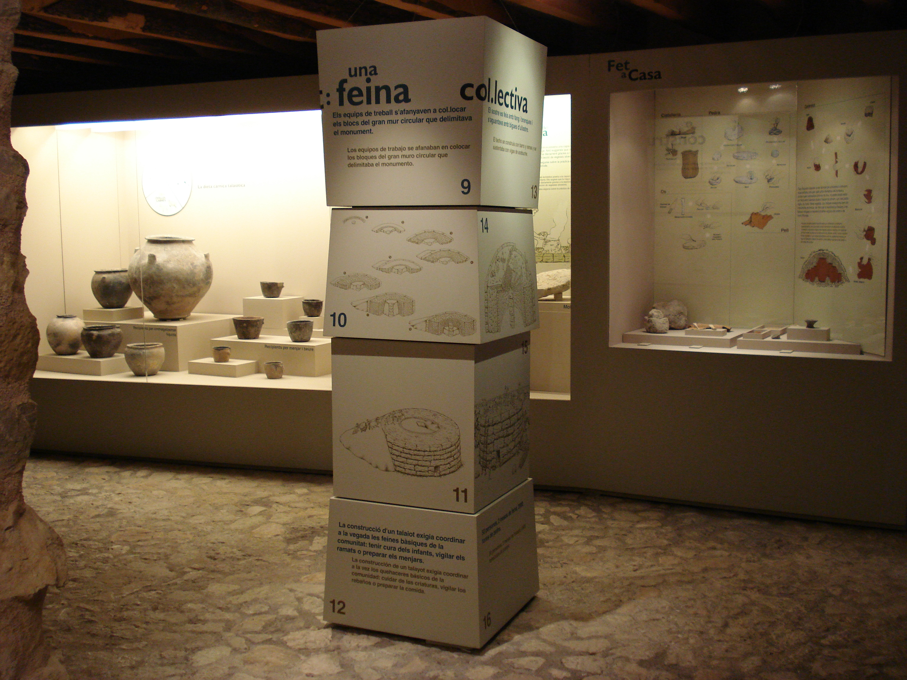 Sala amb materials d'època talaiòtica trobats al jaciment de Son Fornés